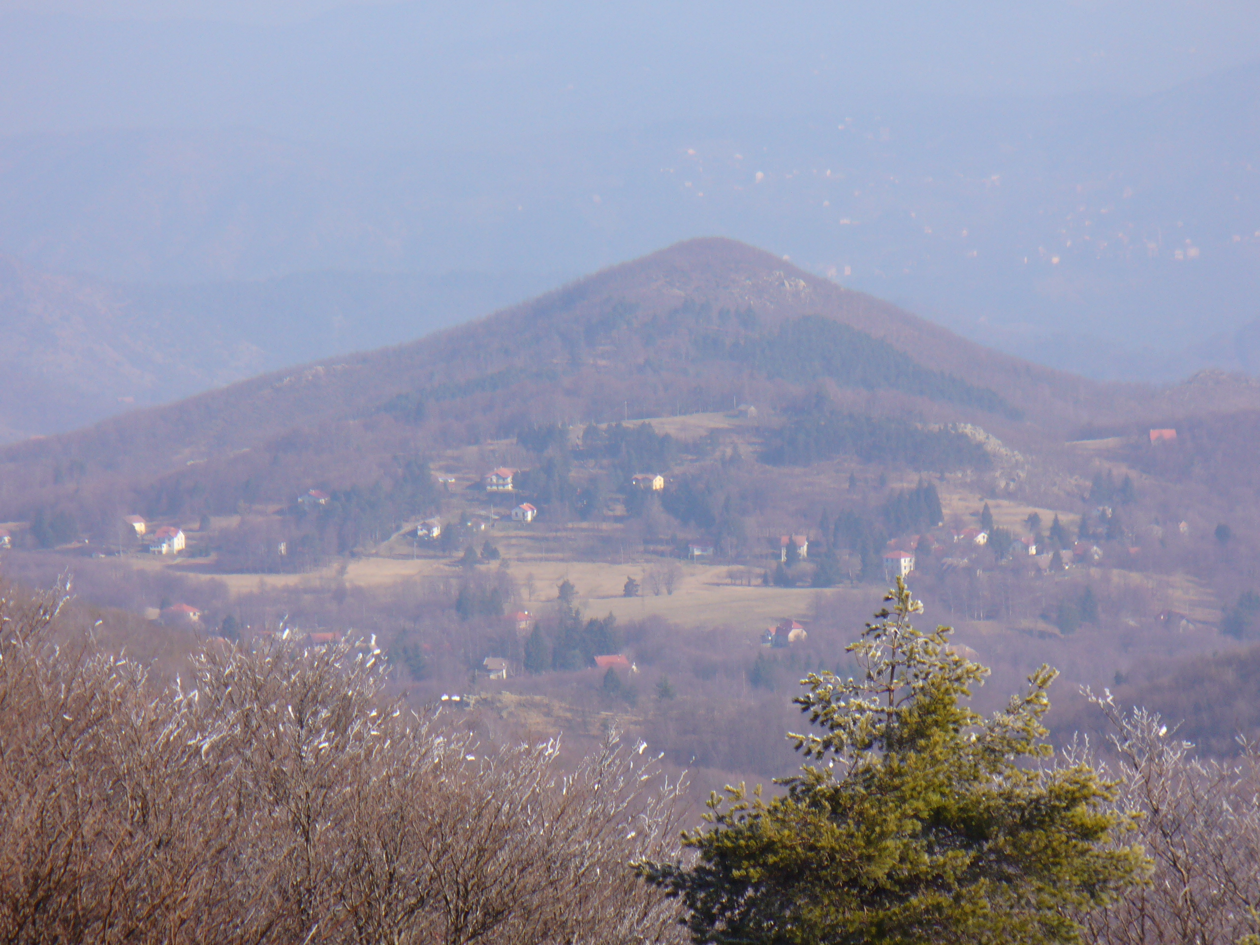 Piampaludo, Sassello - Savona, Liguria (Italy)